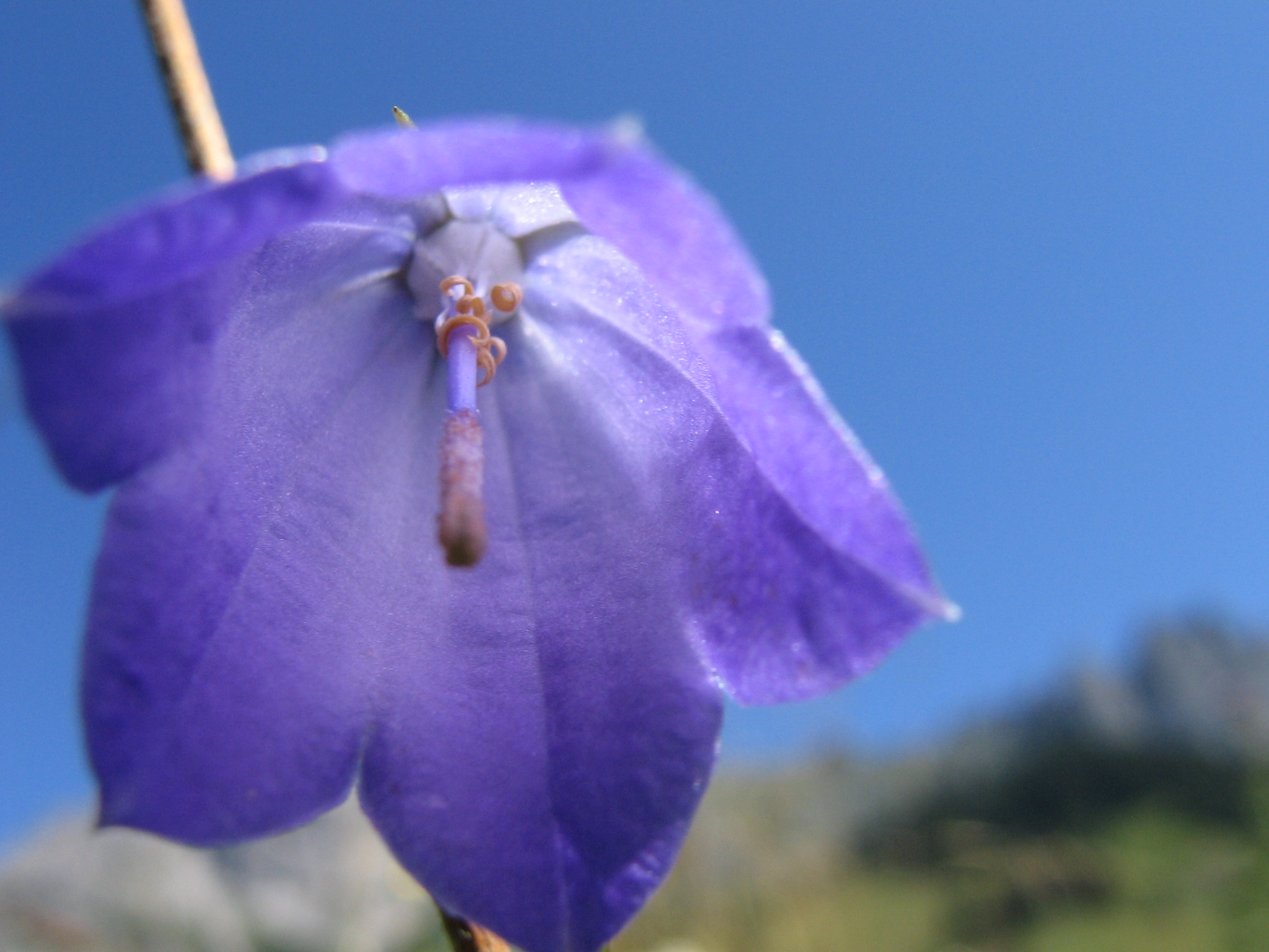 Rundblättrige Glockenblume (Campanula rotundifolia)